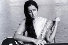 אוסנת שרה